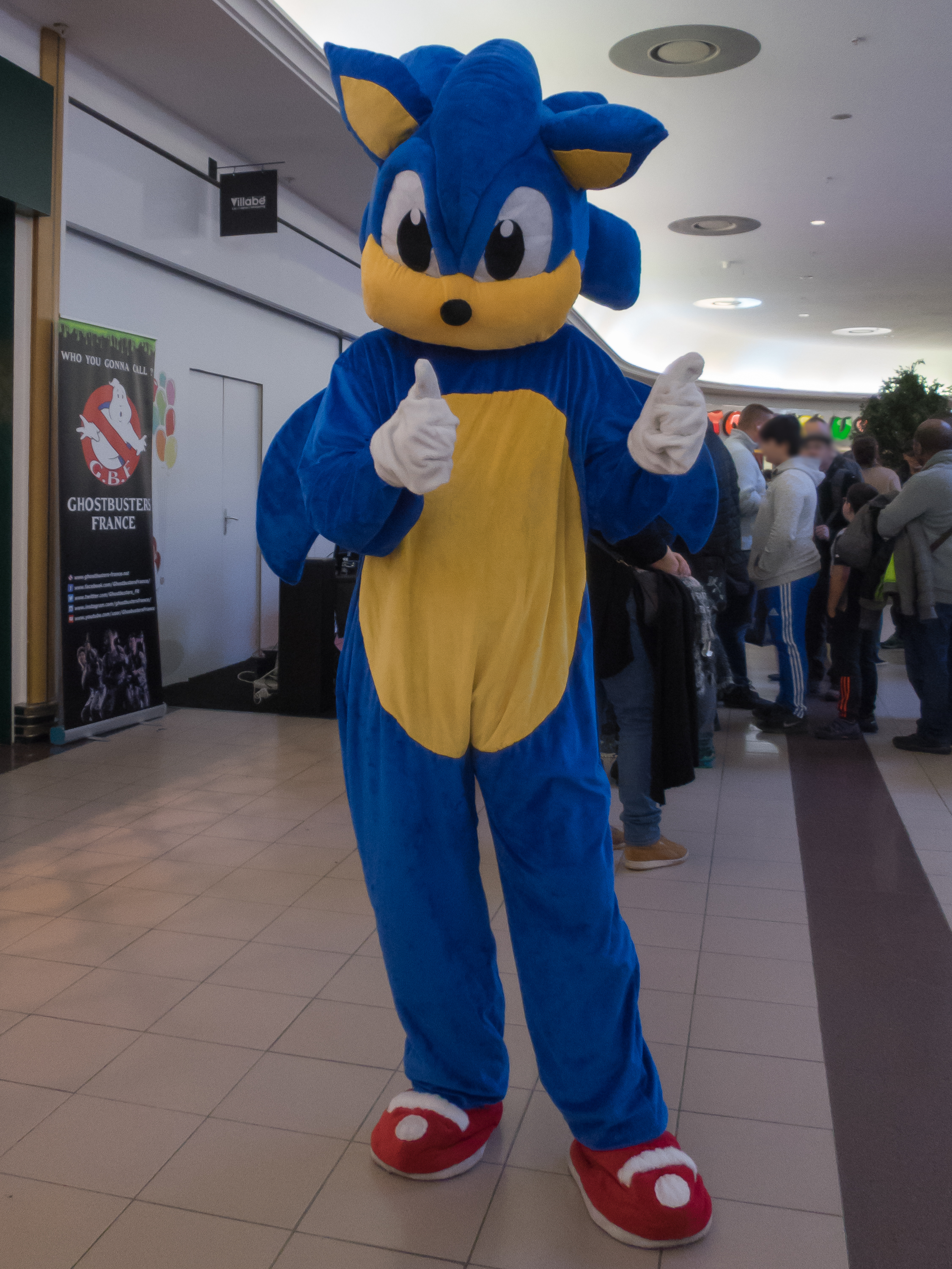 Cosplay de Sonic lors de l'animation "Come Back to the Future" au centre commercial Villabé - A6, le 2 mars 2018 / Villabé - Essonne - France